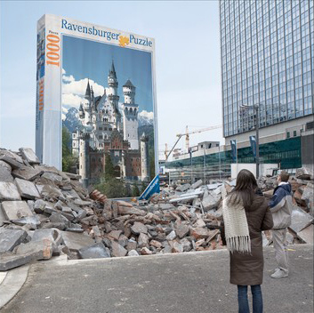 Überdimensionale Version eines Ravensburger-Puzzles, eine Guerilla-Marketing-Aktion der Berliner Agentur Scholz & Friends für den Spielehersteller Ravensburger. Mit riesigen Planen bezogene selbst konstruierte Vorrichtungen platziert auf Baustellen, an denen kürzlich Gebäude eingerissen wurden. Die herumliegenden Teilchen komplettierten den Eindruck eines Mega-Puzzles mit großen 1000-Teile-Puzzles.